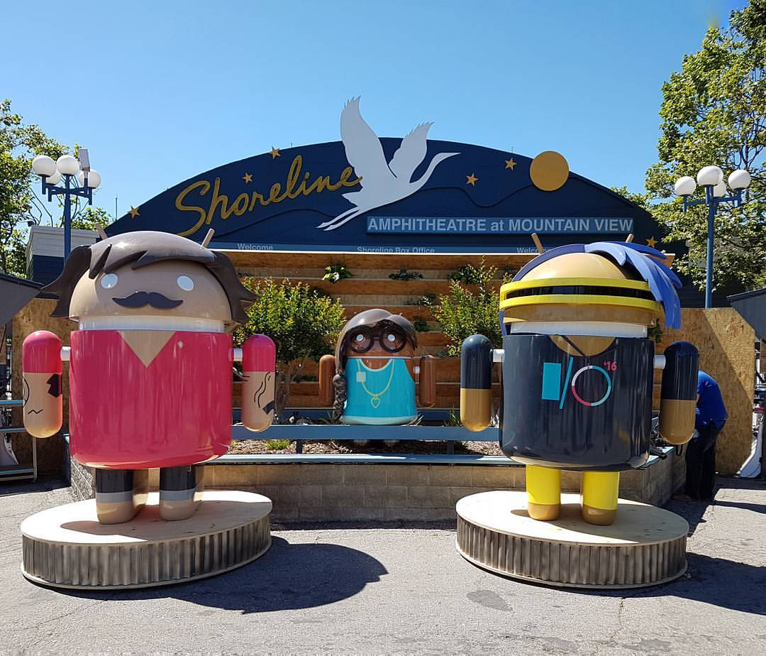 Google I/O 2016 at Shoreline Amphitheatre in Mountain View, California. Конфа Google I/O в этом году - это как-то так. И жара поболее 30°